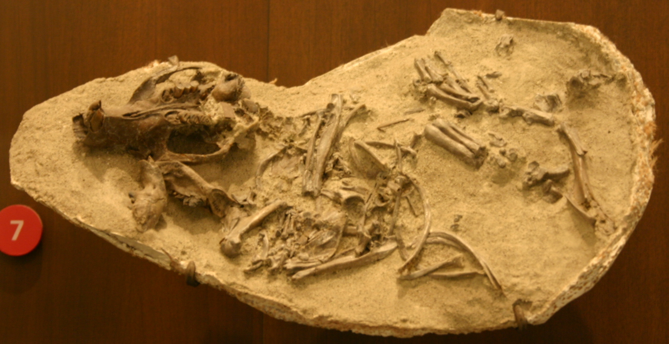 true beaver Visit my blog at